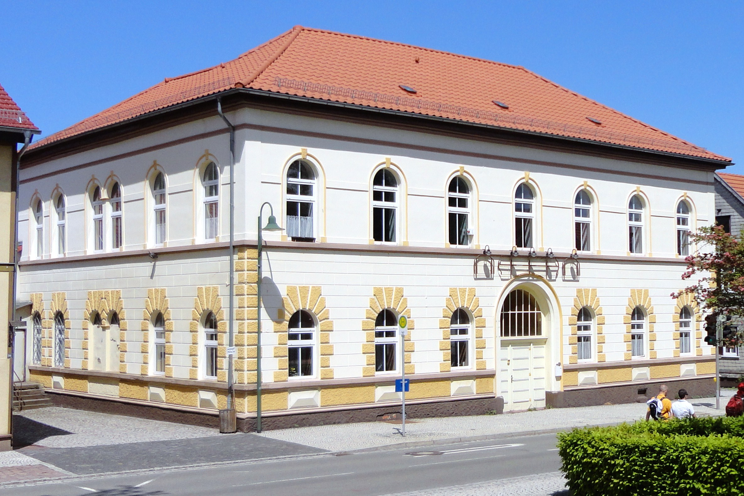 Antikes renoviertes Haus, Hauptstraße 88 in Tambach-Dietharz (2012 Disco).